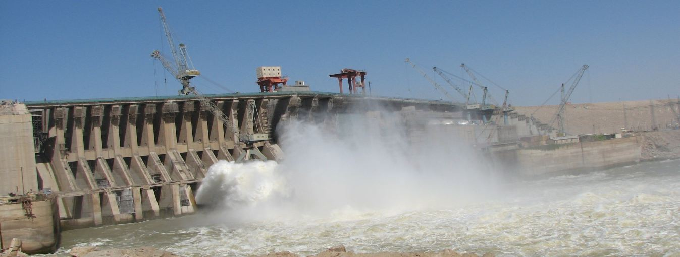 خزان مروي (مقصوص من الصورة الأصلية) بمنطقة النوبة دولة السودان